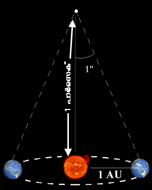 പാർസെക്